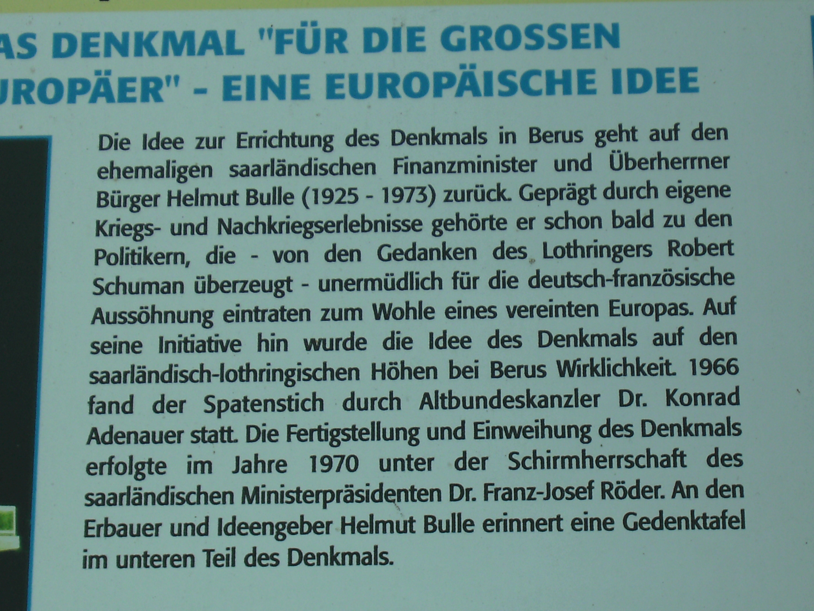 Berus: Europadenkmal - Legende, genannte Personen: Helmut Bulle, Robert Schuman, Konrad Adenauer und Franz-Josef Röder.